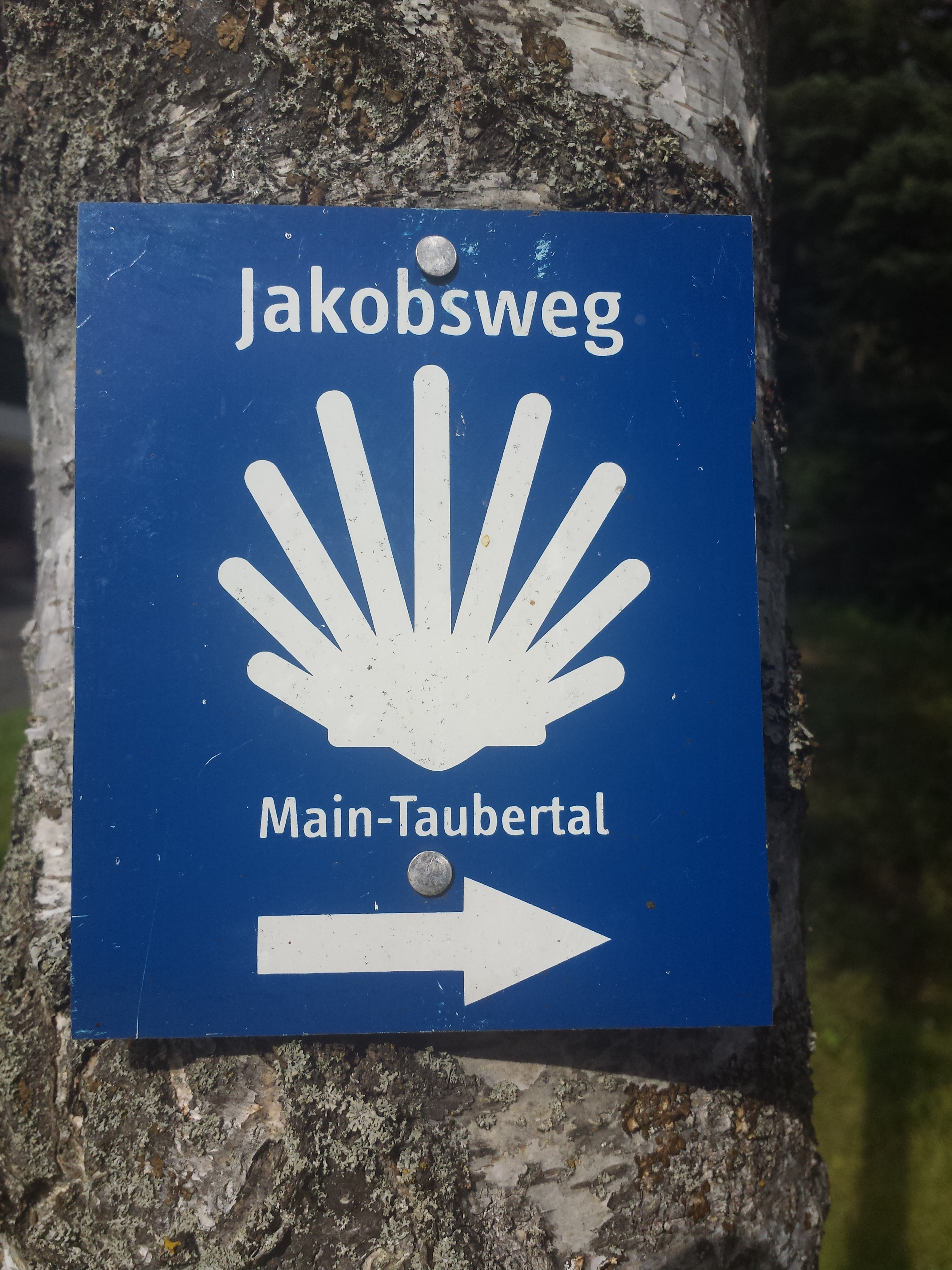 Hinweisschild am Jakobsweg Main-Taubertal in Tauberbischofsheim, kurz vor der Fußgängerbrücke zum Laurentiusberg.